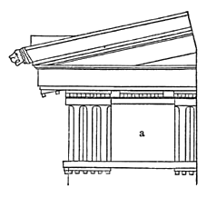 a Metope des dorischen Frieses.